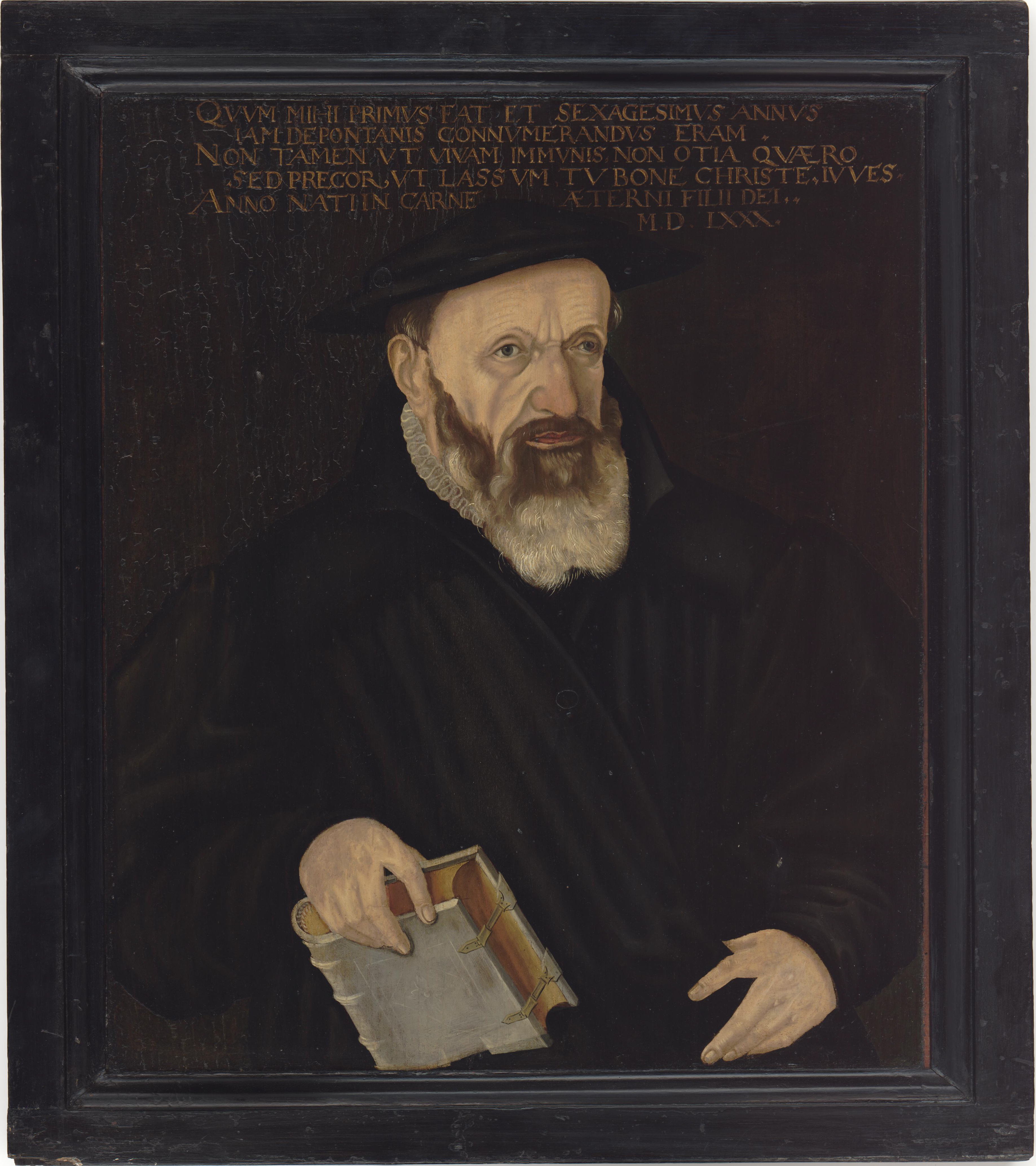 Porträt von Rudolf Gwalter, 1580. Gemälde : Öl auf Holz ; 56,5 x 46,5 cm. Zentralbibliothek Zürich, Inv 104a.